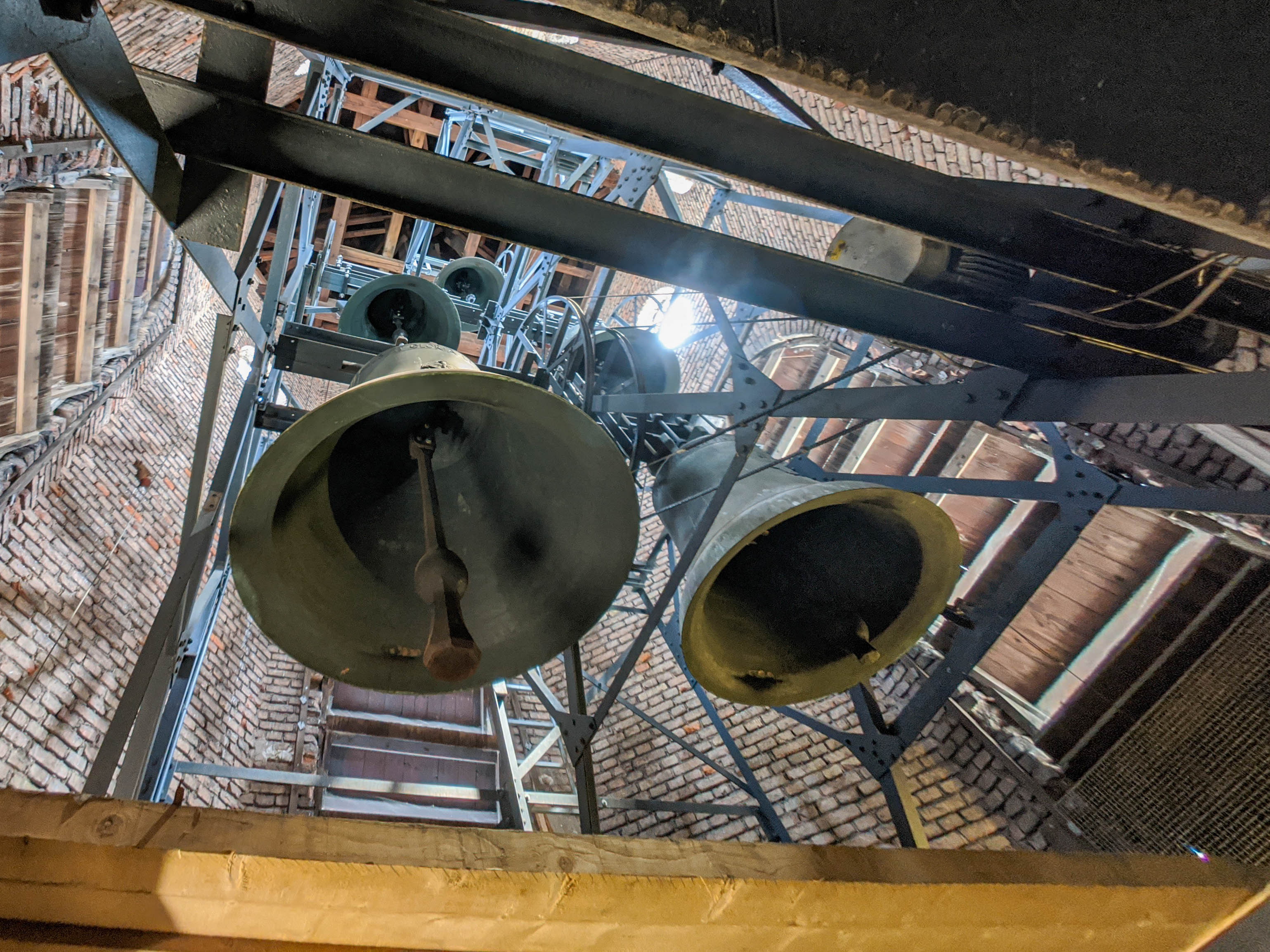 Der obere Glockenturm mit seinen fünf Glocken in der Münchner Kirche am Josephsplatz.